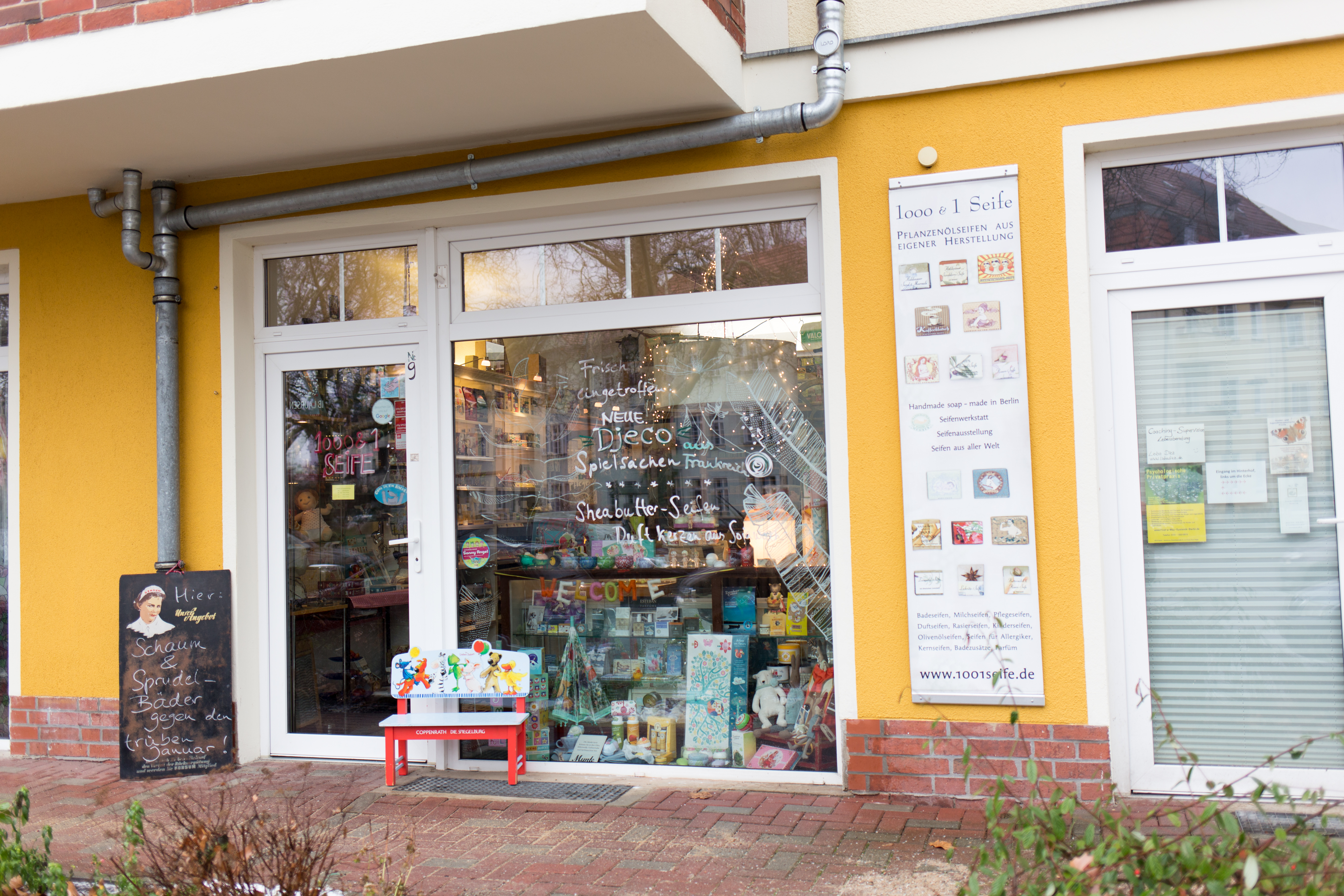 Straßenansicht der Ehrenfelsstraße in Berlin-Karlshorst